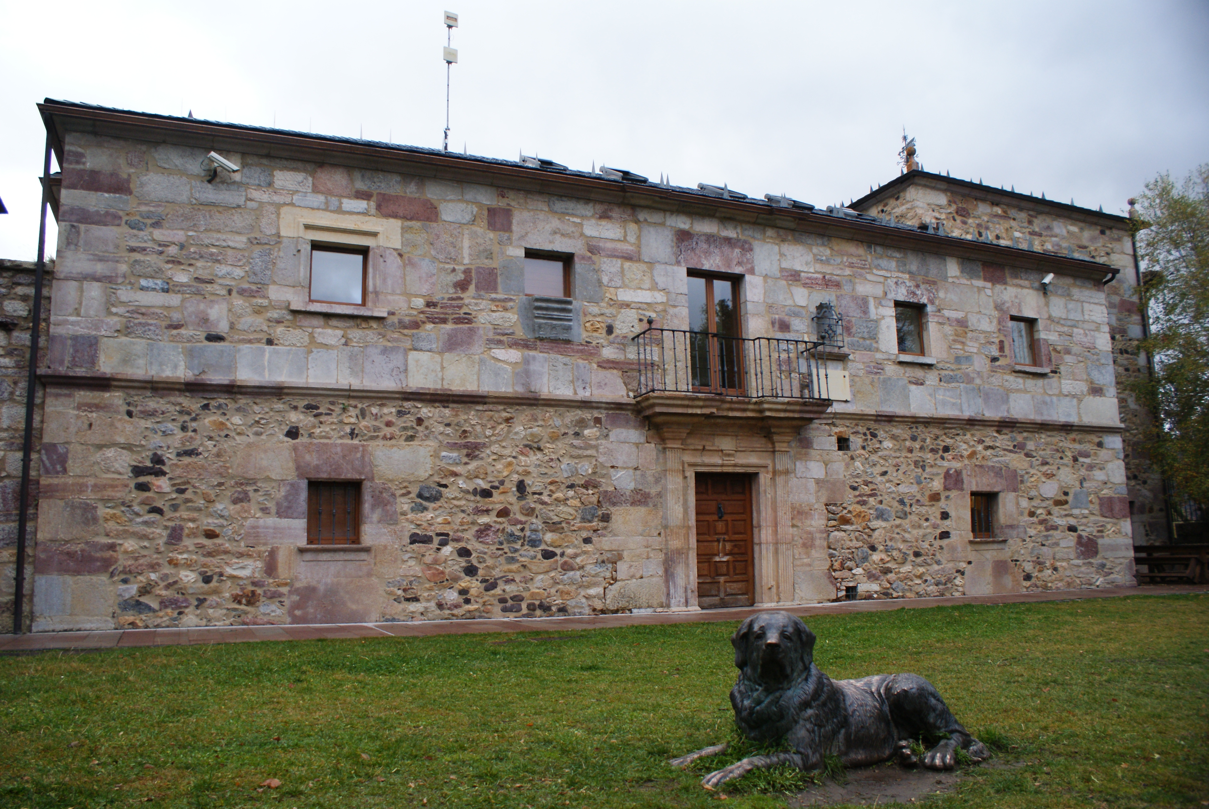 Fotografía de la Casa del Parque Natural de Babia y Luna en la localidad de Riolago de Babia.